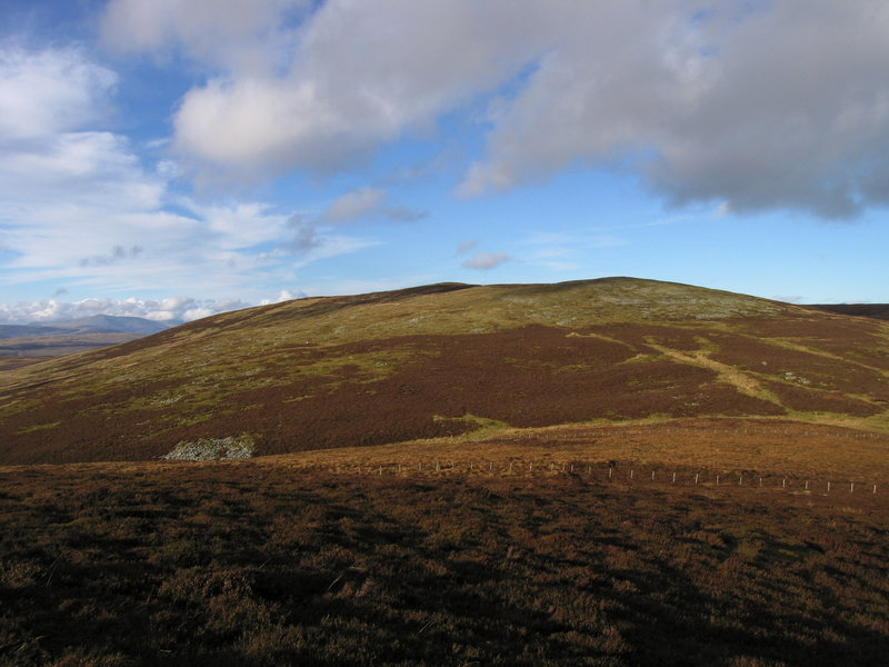 Carnedd Llechwedd-llyfn from Foel Boeth